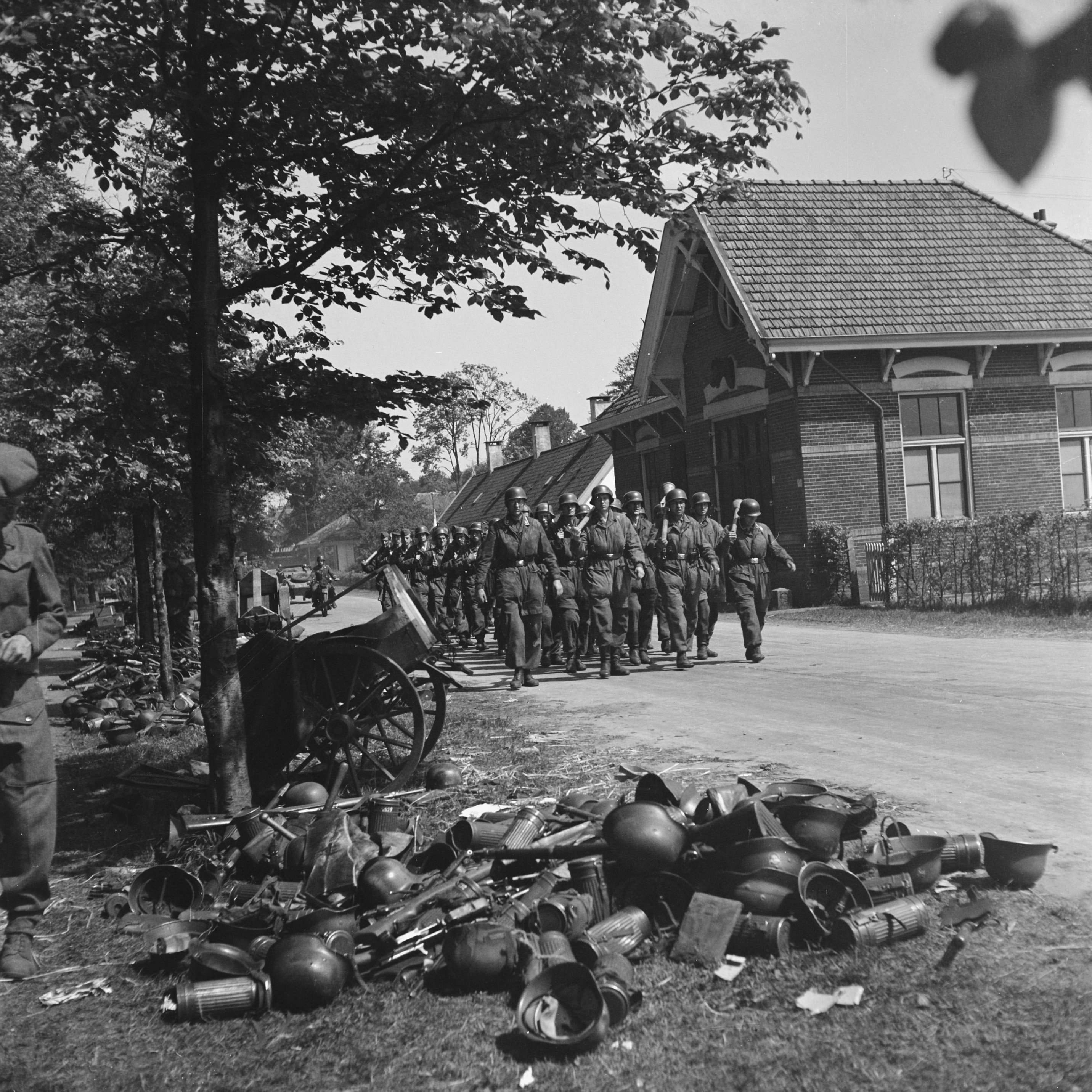 Collectie / Archief : Fotocollectie Anefo Reportage / Serie : Capitulatie: Soest Beschrijving : Duitse militairen op weg naar het wapendepot in Soest, waar de Duitsers hun wapens moeten inleveren Annotatie : Luftwaffe militairen waarschijnlijk van het 6 Fallschirmjäger Division marcheren nog gewapend met pantservuisten en geweren Datum : 10 mei 1945 Locatie : Soest, Utrecht (provincie) Trefwoorden : helmen, militairen, wapens Fotograaf : Poll, Willem van de / Anefo Auteursrechthebbende : Nationaal Archief Materiaalsoort : Negatief (zwart/wit) Nummer archiefinventaris : bekijk toegang 2.24.01.03 Bestanddeelnummer : 900-3118